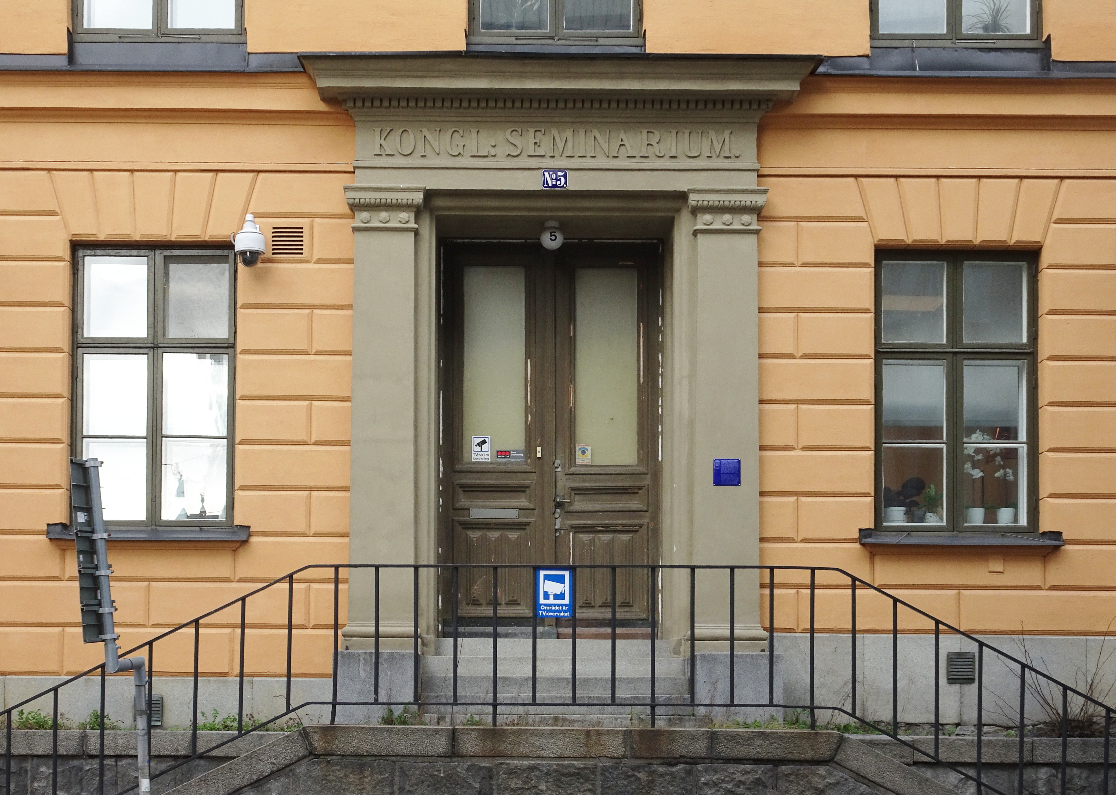 Högre lärarinneseminariet, portal, Riddargatan 5